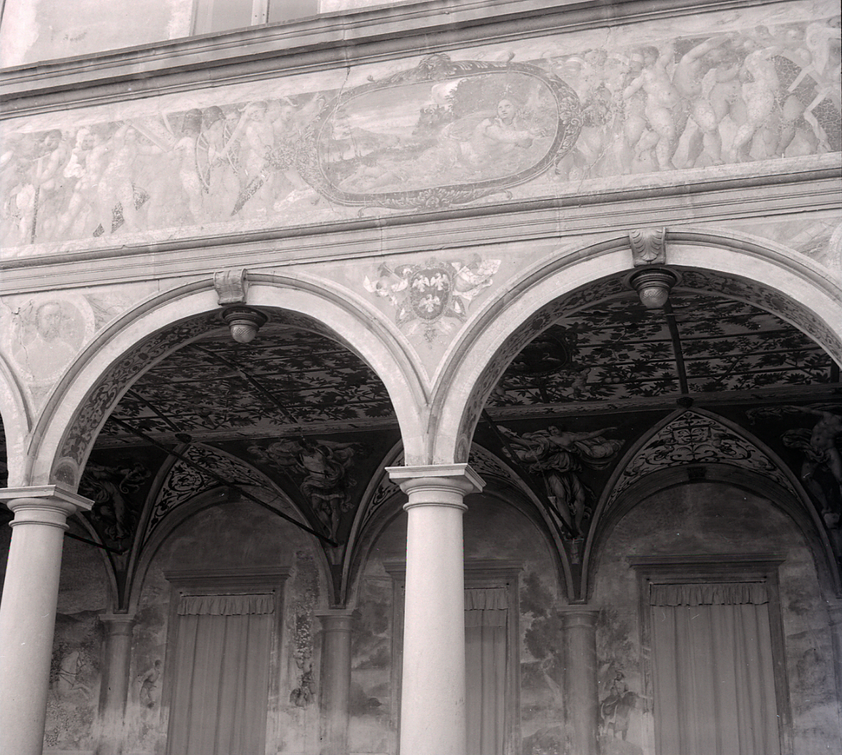 Bisuschio. Villa Cicogna Mozzoni. Serie fotografica : Bisuschio, 1975 / Paolo Monti. - Buste: 10, Fototipi: 10 : Negativo b/n, gelatina bromuro d'argento/ pellicola ; 6x6. - ((Serie costituita da 10 negativi identificati con la numerazione: 3593-3602. Sulla busta R3593 manoscritto: "Villa Cicogna/ Bisuschio". La suddetta serie è contenuta nella scatola identificata con la numerazione R3499/3788. Sul coperchio iscrizione manoscritta a pennarello: "1 Località varie".